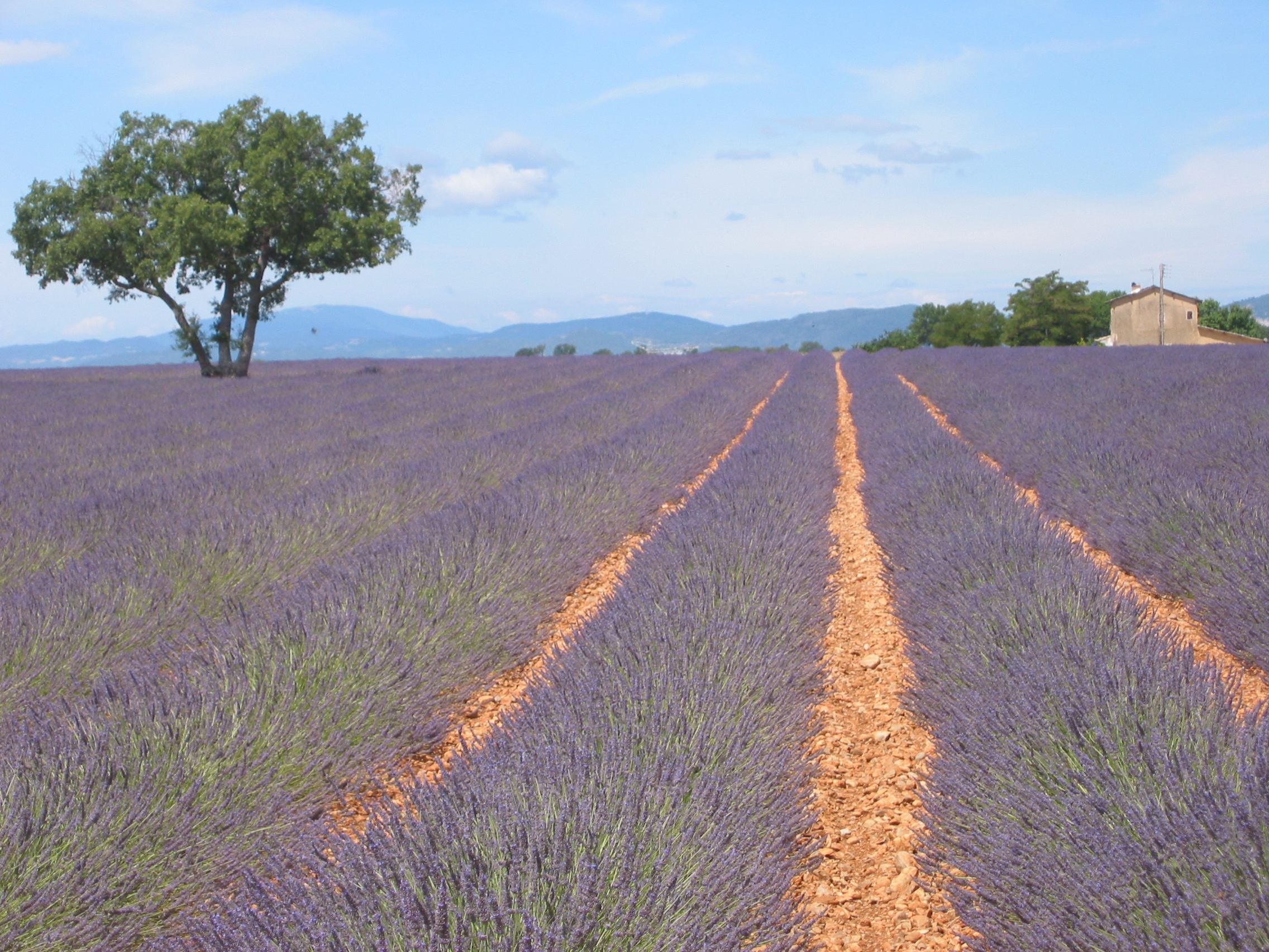 Plateau de Valensole, Alpes de Haute Provence, France. Champ de Lavandin Photo prise le 8 Juillet 2005. Aut : Jddmano